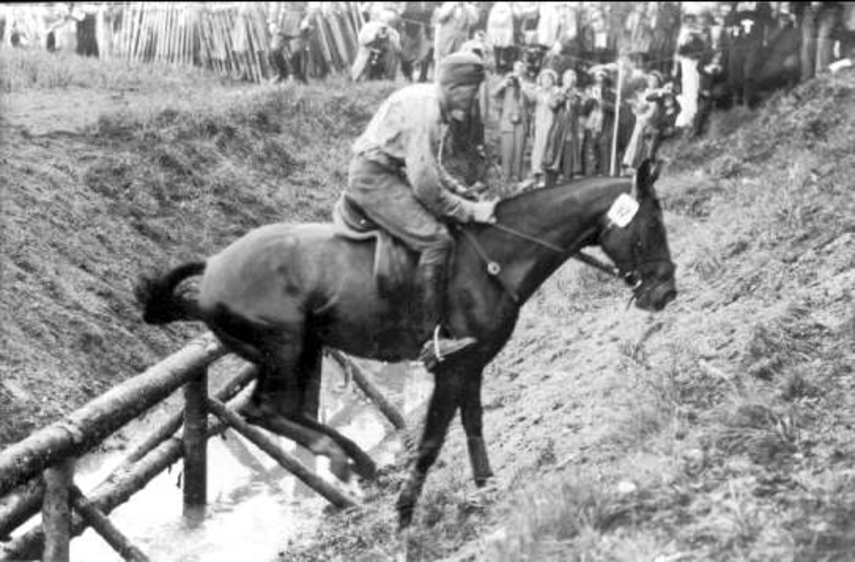 Ryttarolympiaden 1956, sergeant Petrus Kastenman på Iluster passerar det mycket omdiskuterade hindret nr 22 på fälttävlans terrängprov ute på Järvafältet, norr om Stockholm.